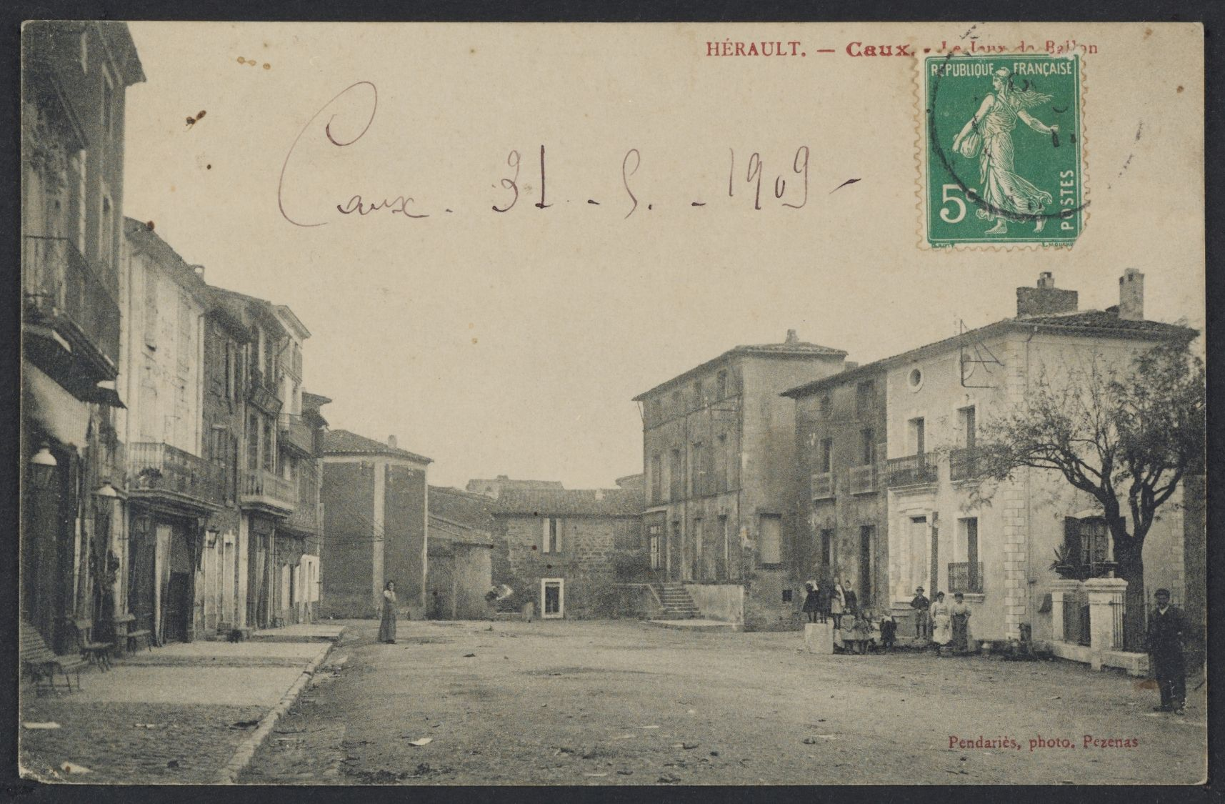 Caux - Le Jeu de Ballon : carte postale